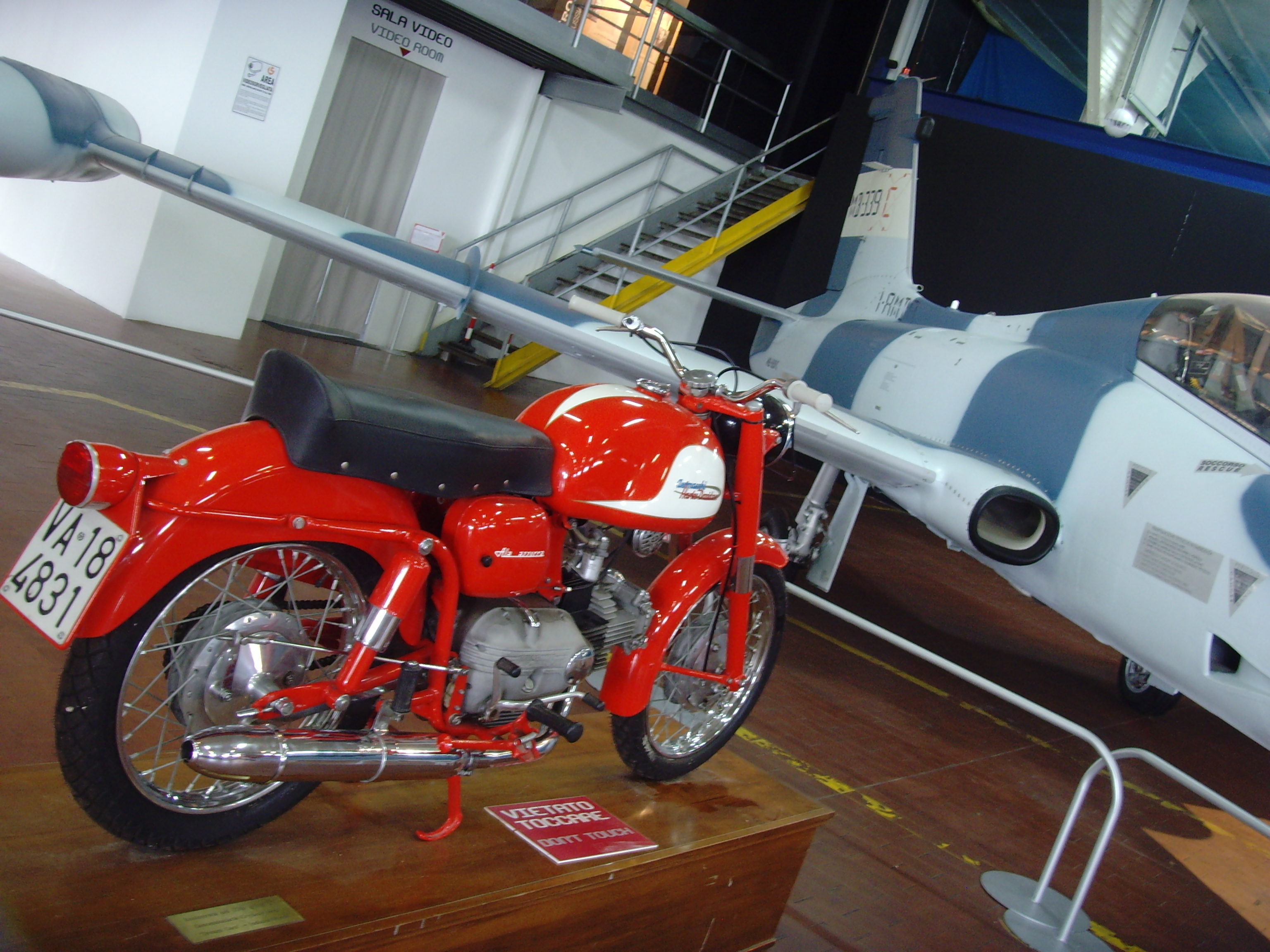 27 Volandia - Aermacchi